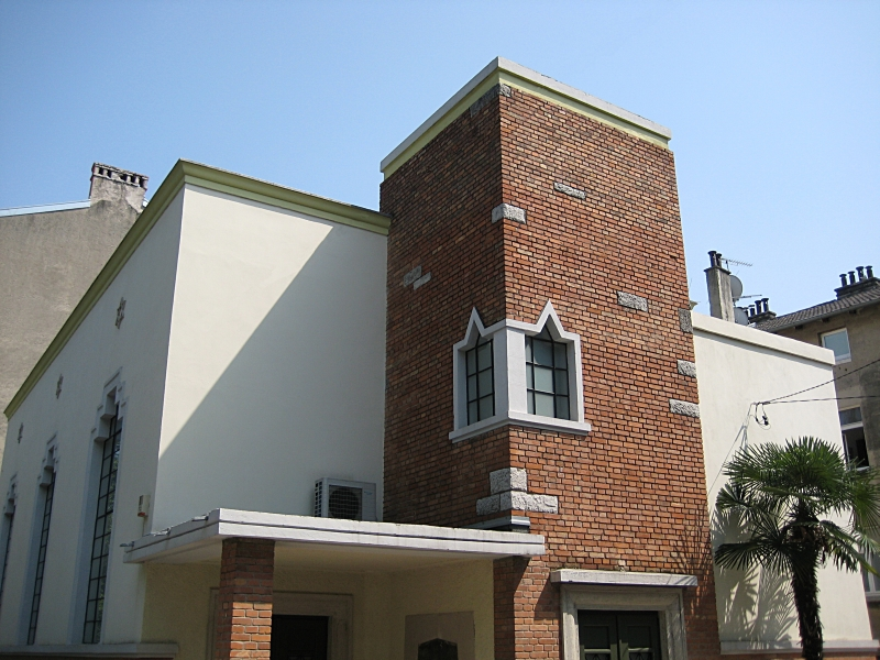 Riječka sinagoga